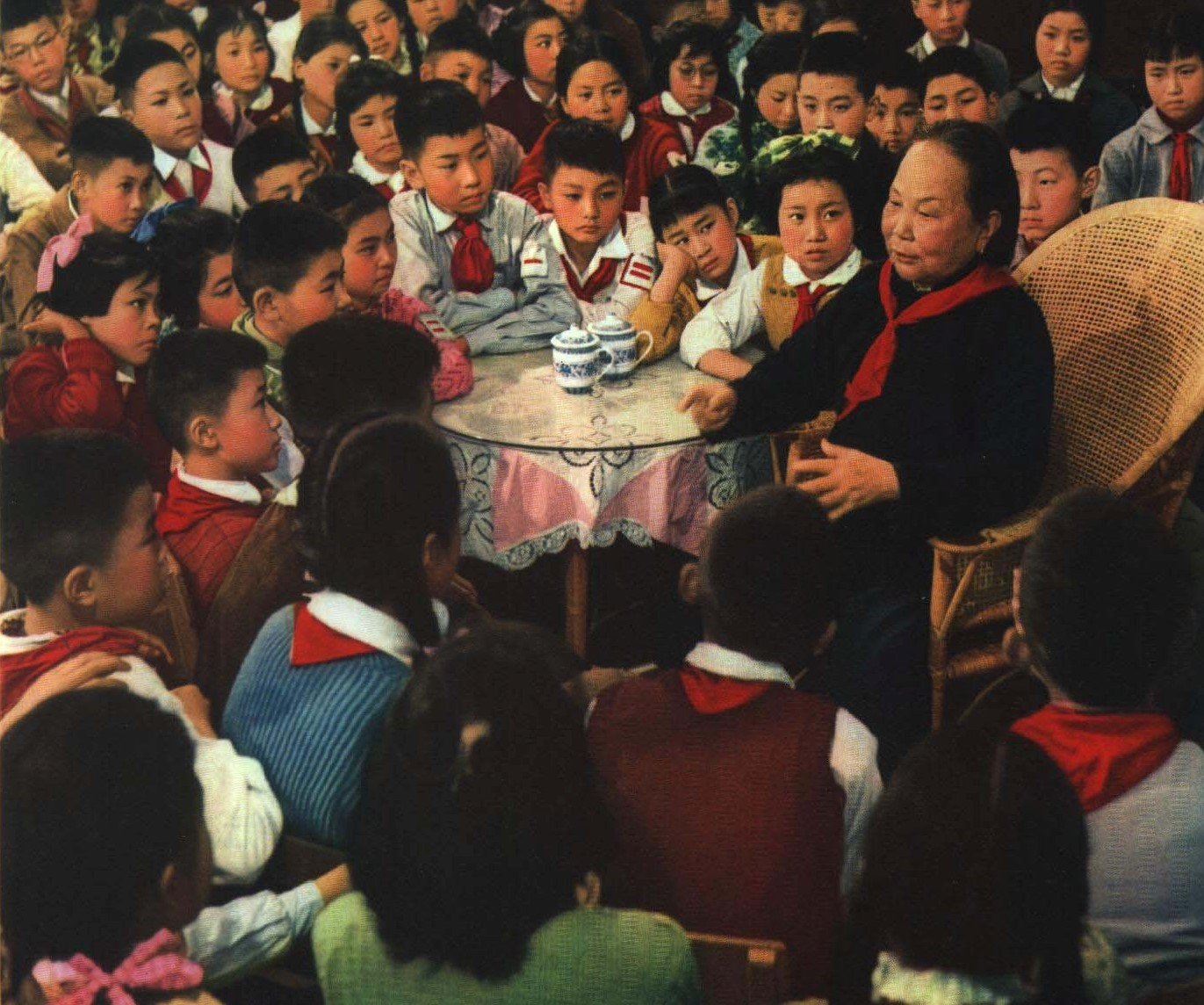 1965-3 1965年 五卅经历者施小妹给学生讲历史